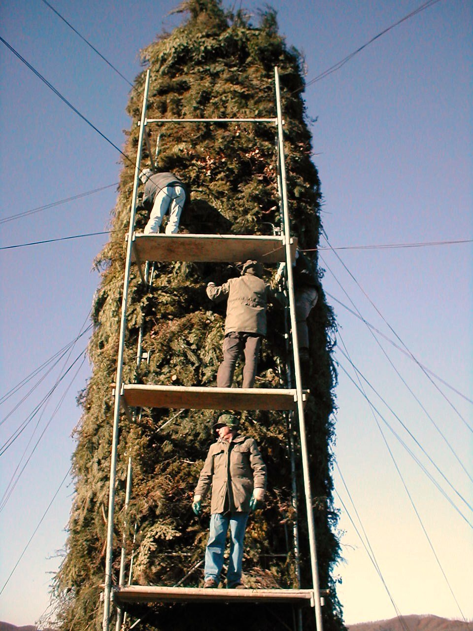 Daniele Romei, personale, costruzione del falò santo natale 2007 Verrucolette, frazione di Minucciano (Lucca)